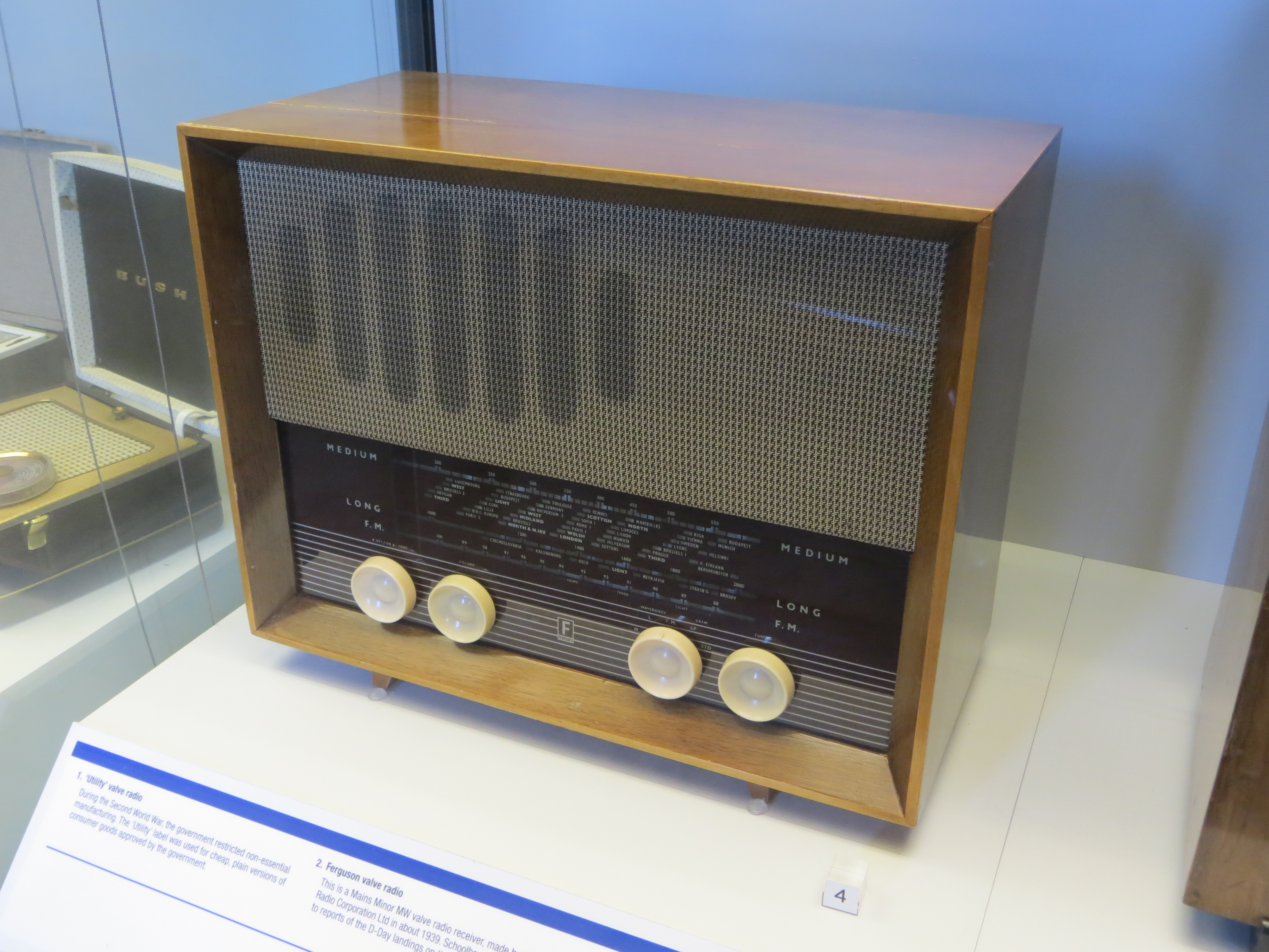 Ferranti Model 255 radio, 1956 model year, six tubes.